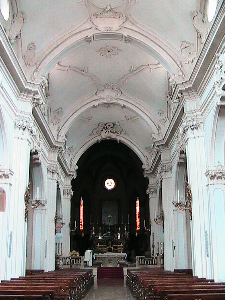 Busseto - Chiesa Collegiata di San Bartolomeo